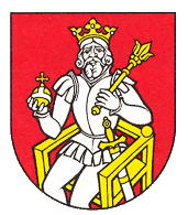 Escudo de armas